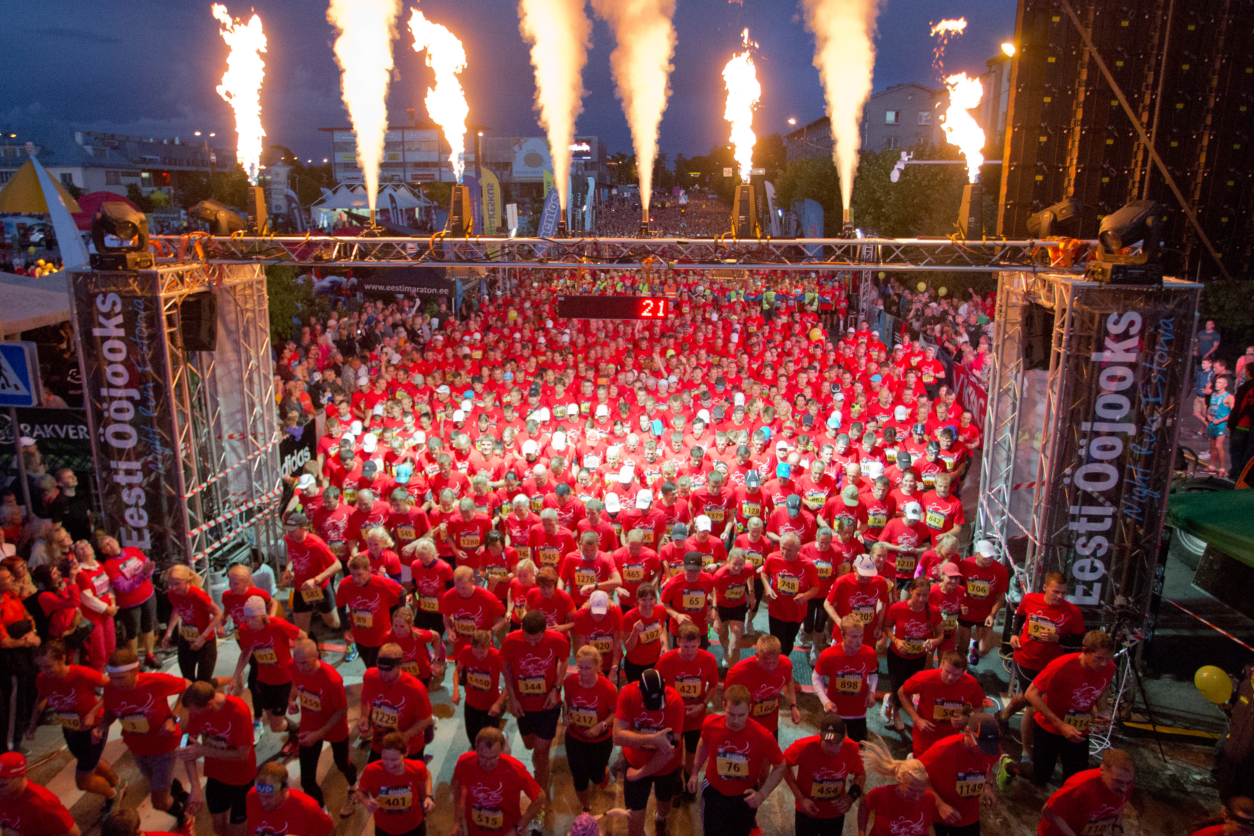 Oojooks4 start-2014